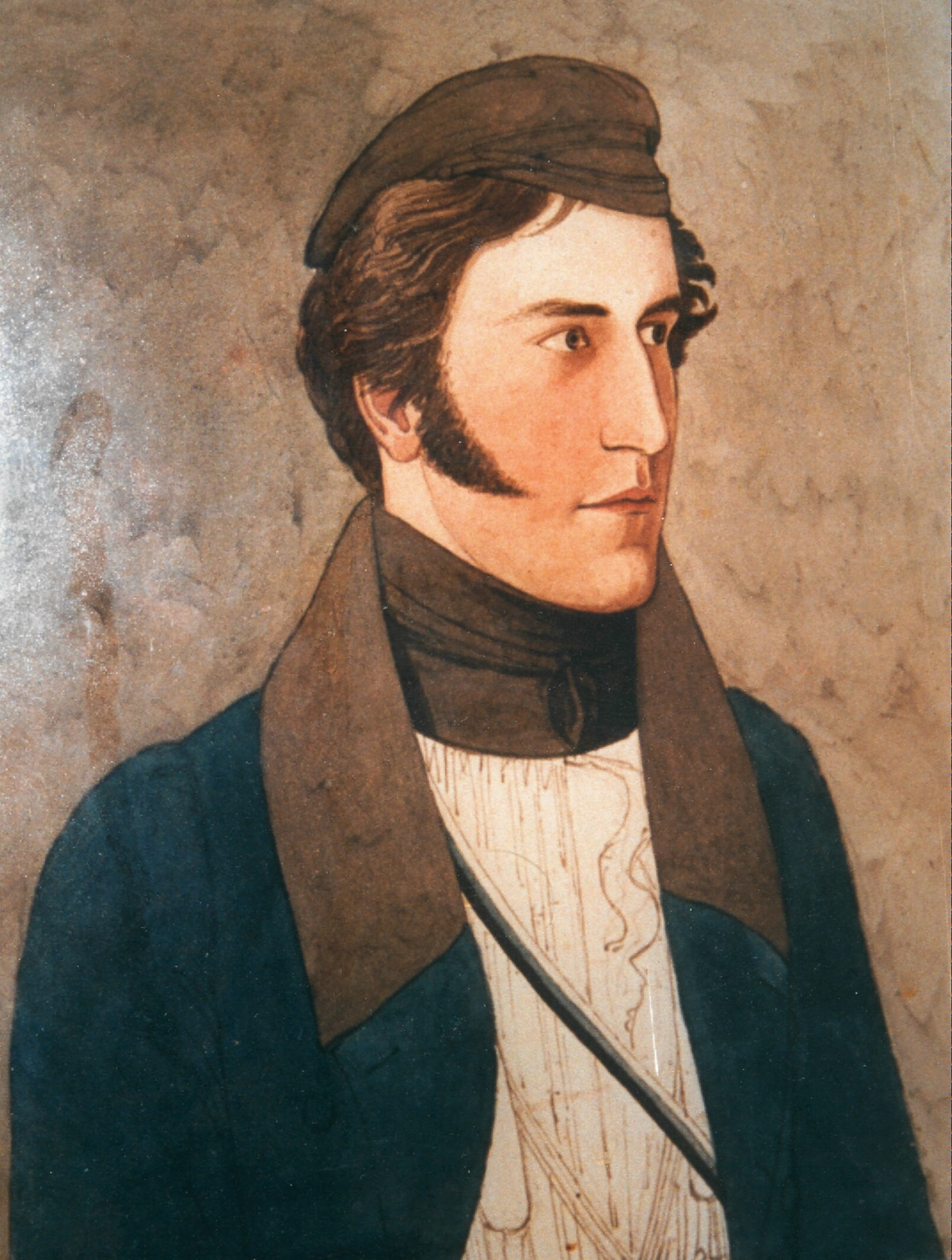 Depicted person: Franz Xaver Zenger – German legal scholar